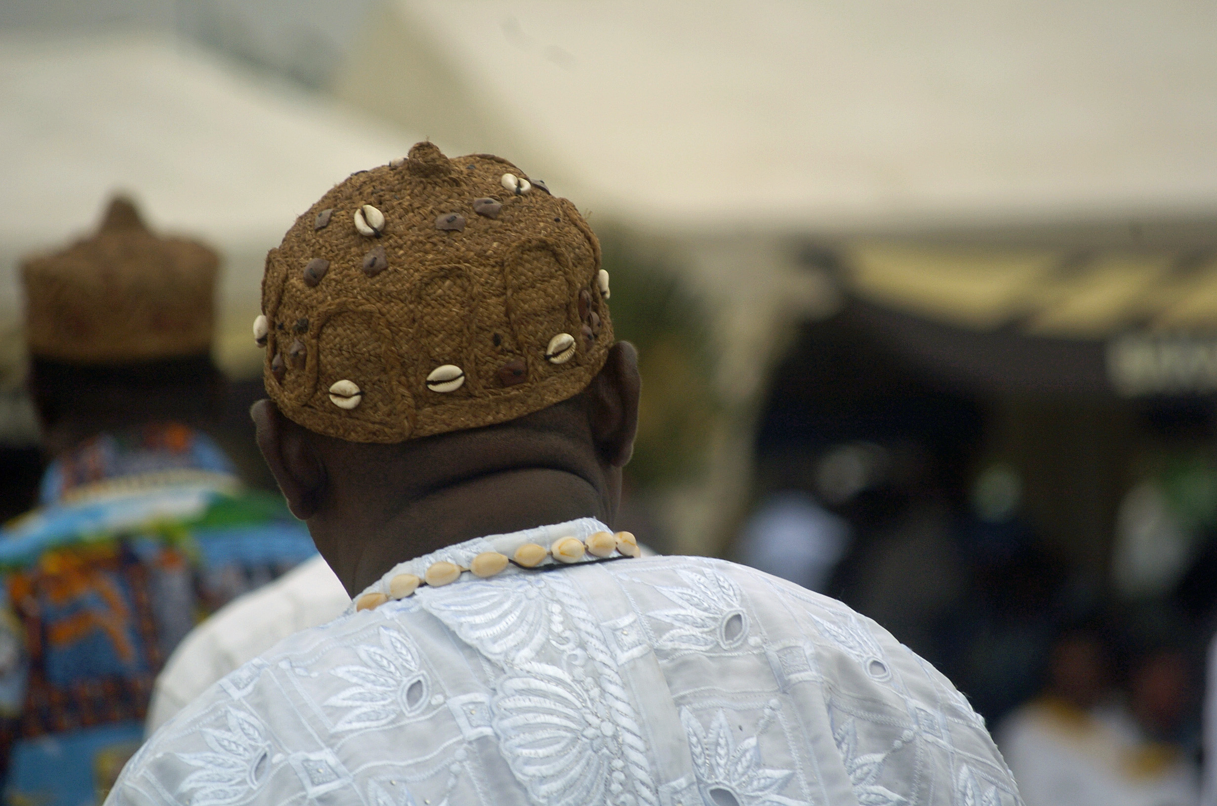 Autorité traditionnelle pendant le Ngondo This is an image of Cultural Fashion or Adornment from Cameroon